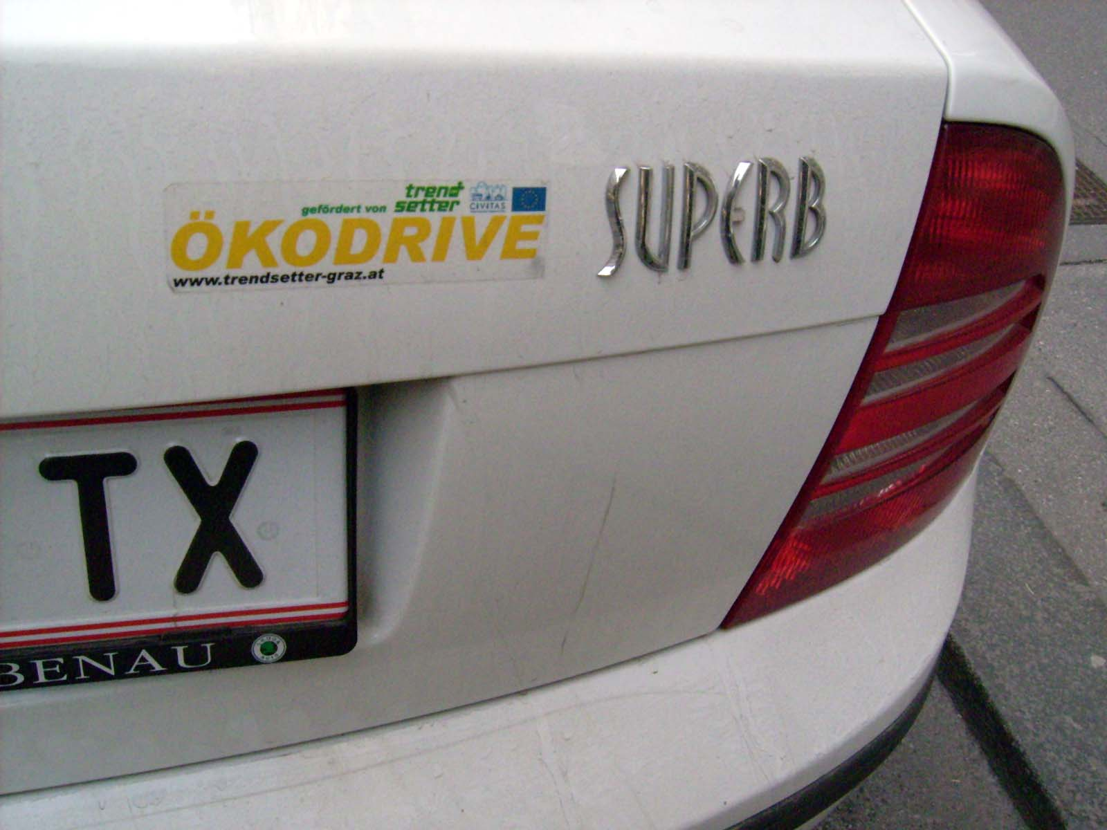 eigene Aufnahme in Graz